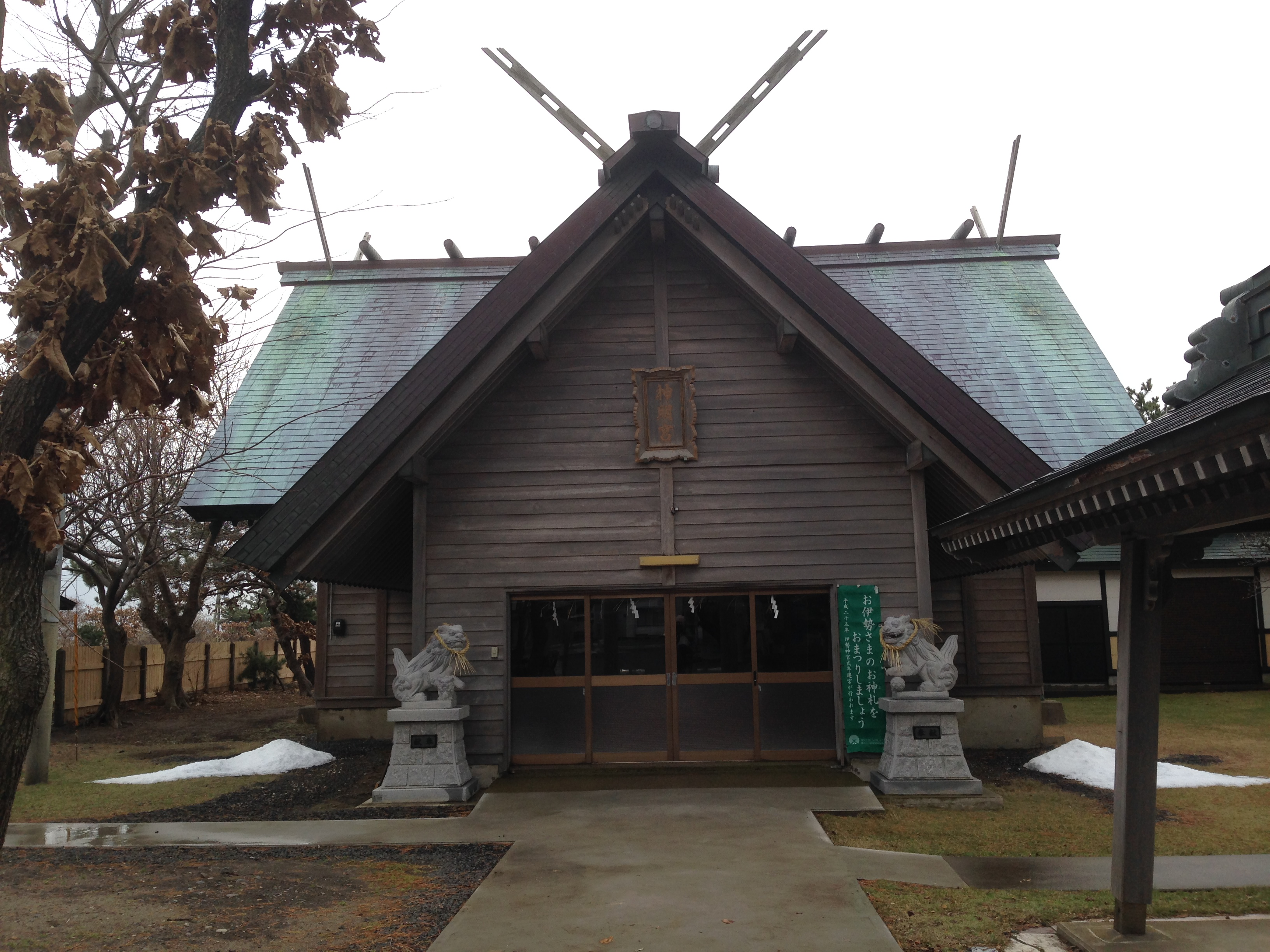 青森県の十三湖西部（十三地区）にある神明宮（拝殿）。なお、付近のバス停の停留所名は「十三神社前」。